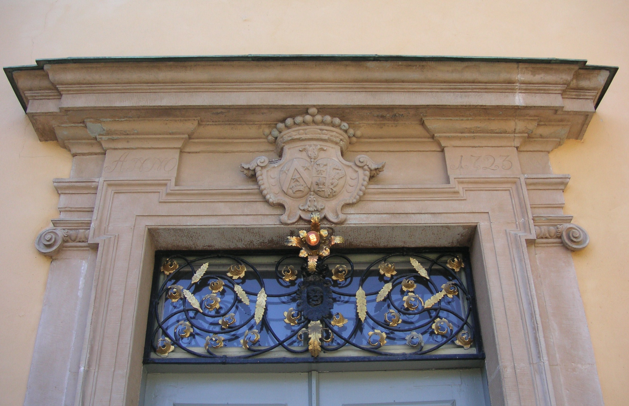 Åkeshovs slott i Bromma, Stockholm